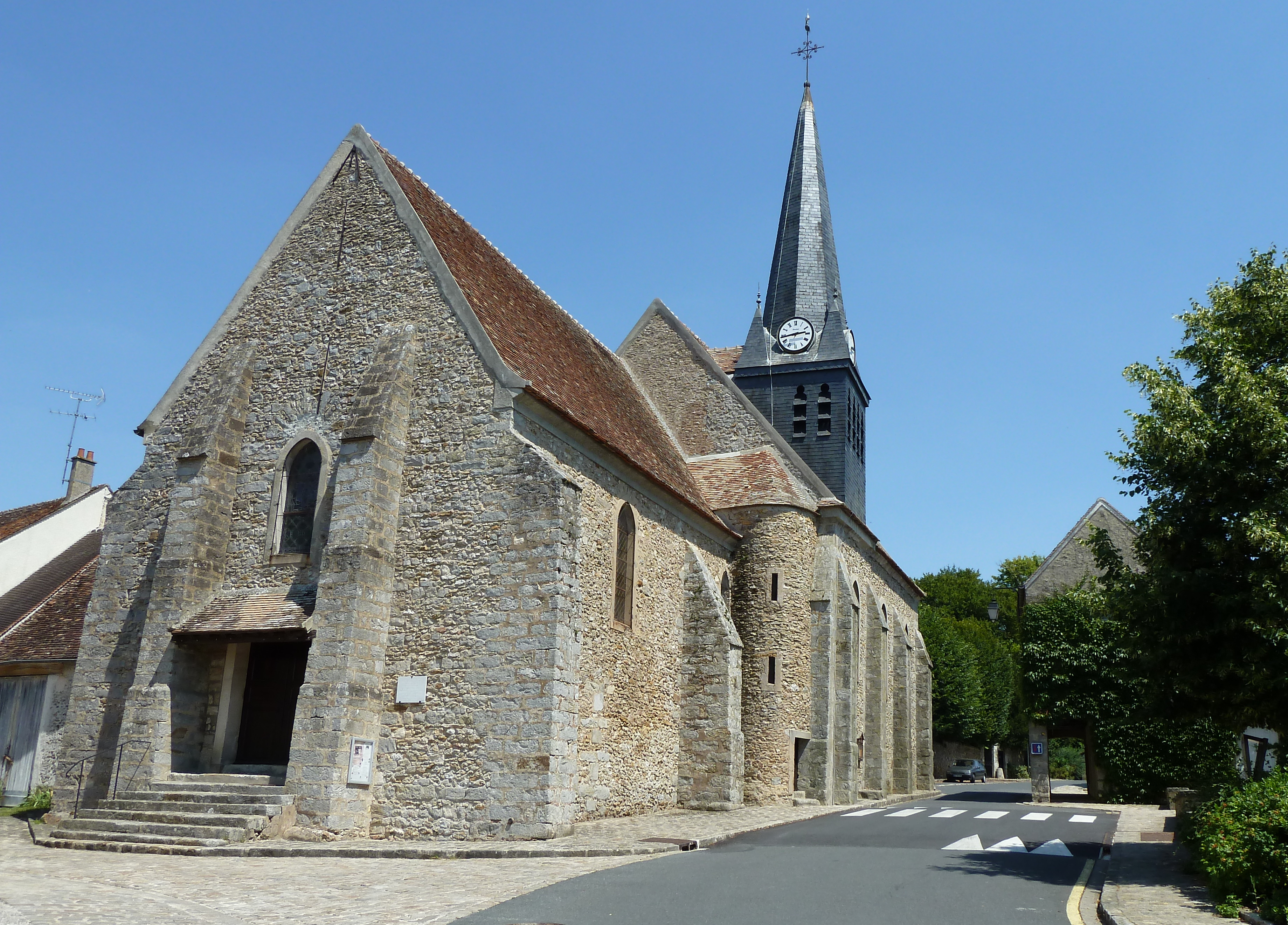 Au niveau du 14, rue de l'église. C'est l'abbé Saint-Merry qui a donné son nom à l'église, ainsi qu'au village.